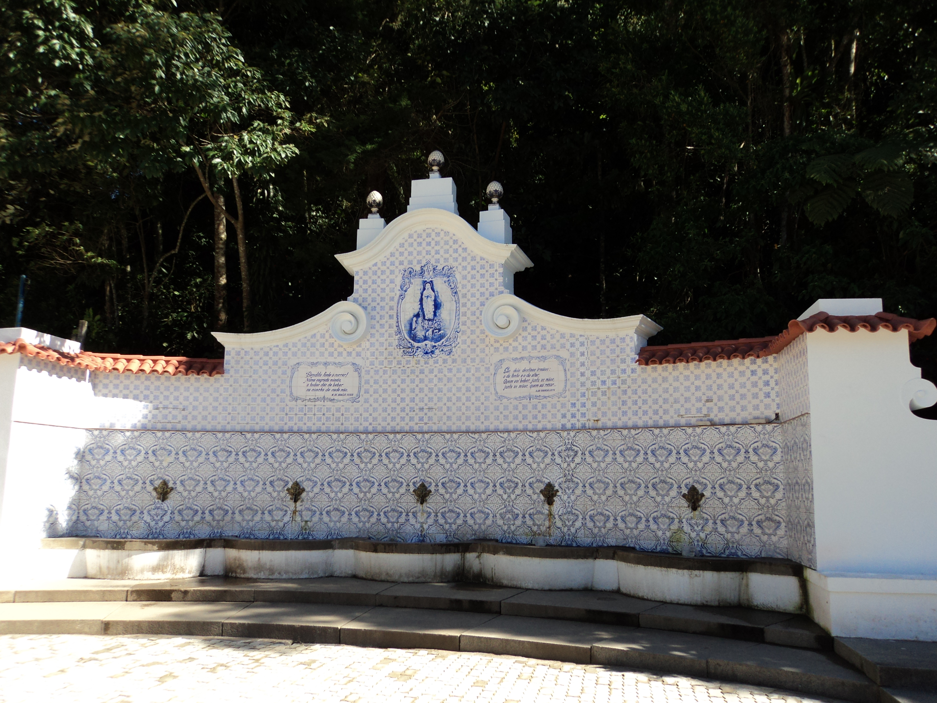 Fonte de agua mineral na parte urbana da cidade de Teresopolis